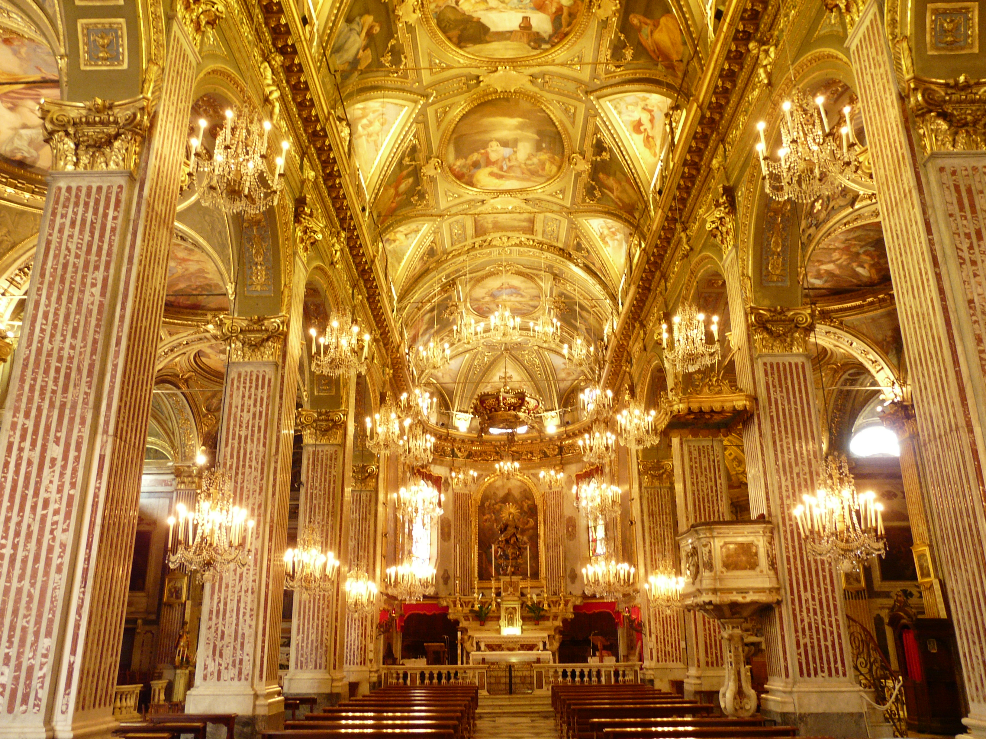 Interni della basilica di Santa Maria Assunta di Camogli, Liguria, Italia